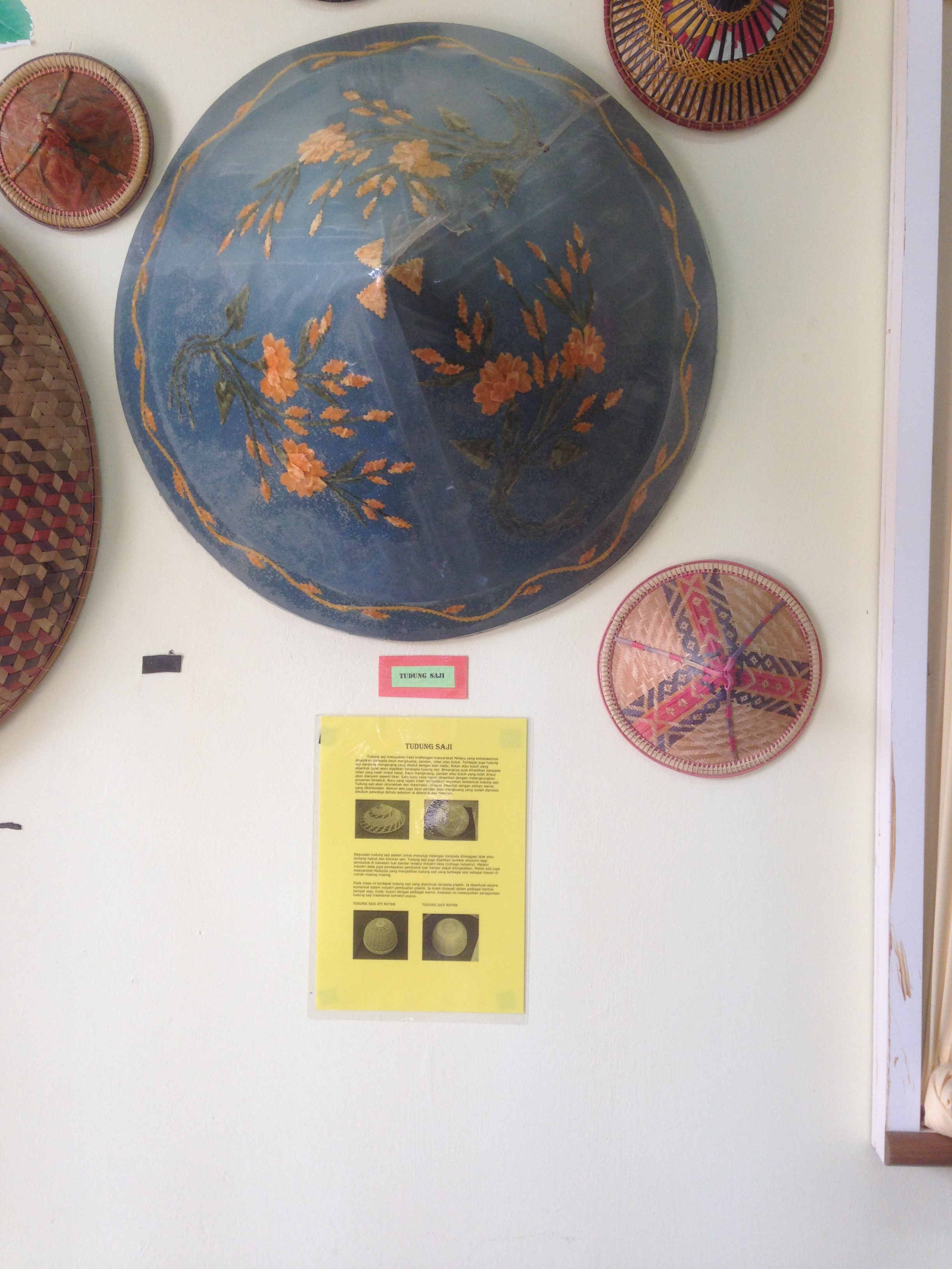 TUDUNG SAJI